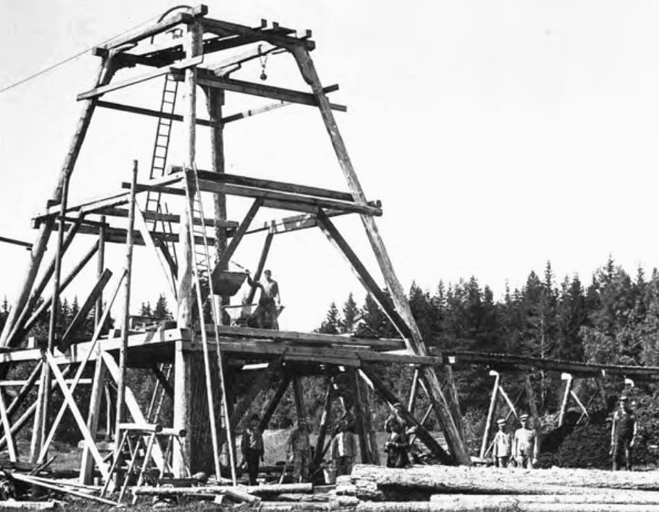 Nytt lavtorn byggs i Bredsjönäs.